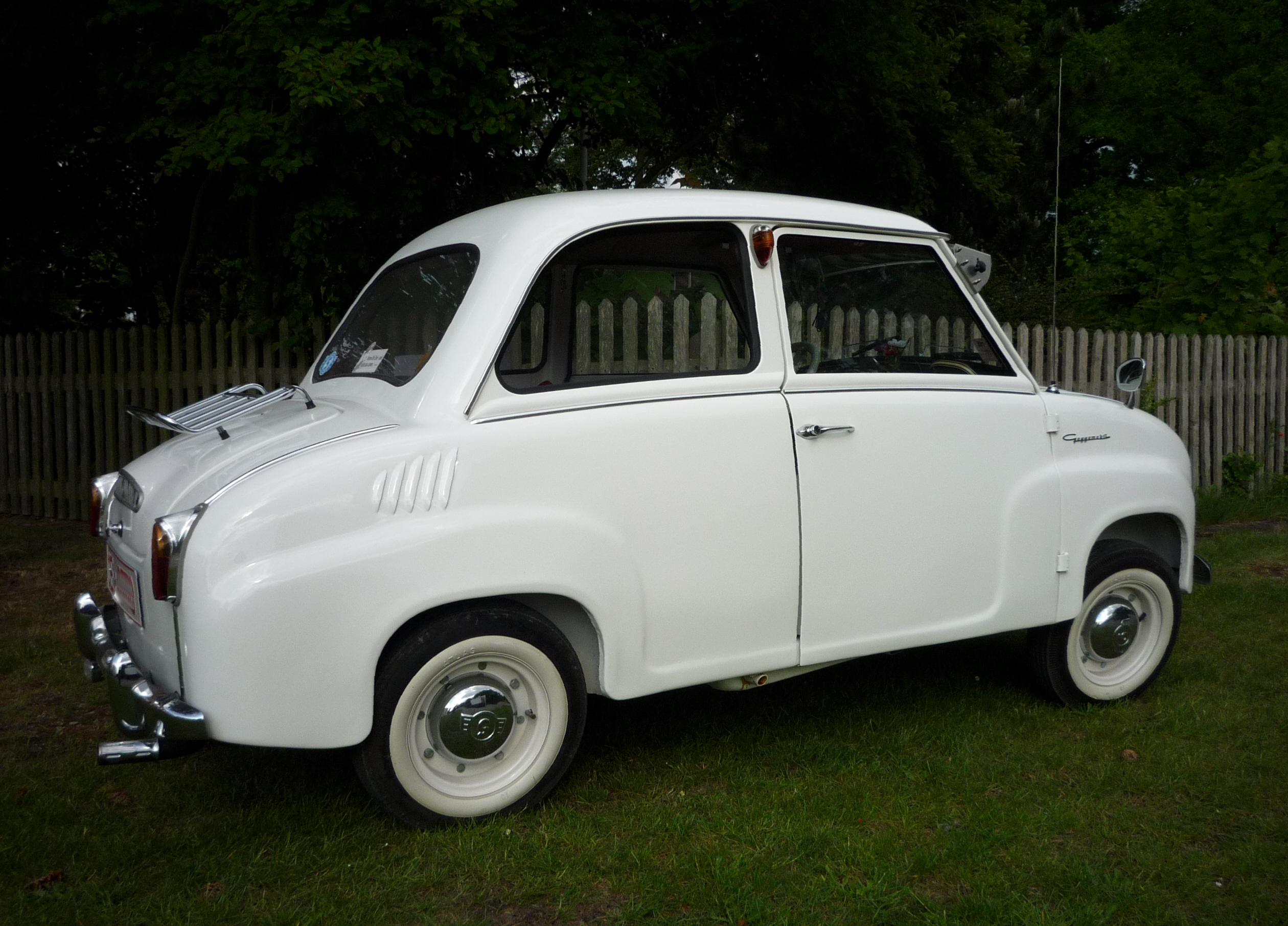 Goggomobil-Limousine T 250 gebaut zum Ende der 1950er Jahre. Zweitakt-Ottomotor, 13,6 PS bei 5000 U/Min., Elektrische Anlage 12 Volt, Leergewicht 415 kg, zulässiges Gesamtgewicht 720 kg, Höchstgeschwindigkeit 80 km/h.